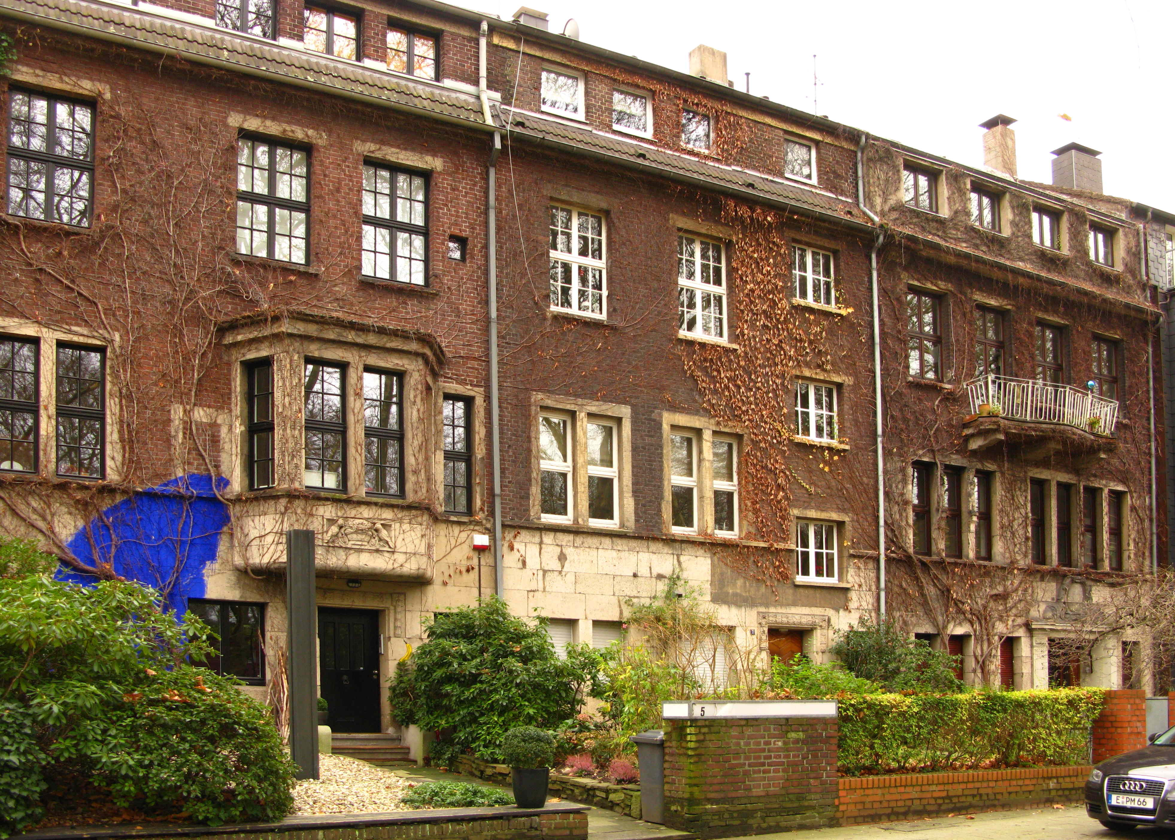 Moltkeviertel Essen: Häuserzeile am nördlichen Moltkeplatz mit Bronze-Stele von Jo Schöpfer, Aussenarbeit "Blaues Pigment" von Katja Hajek und gelber Spray-Banane von Thomas Baumgärtel